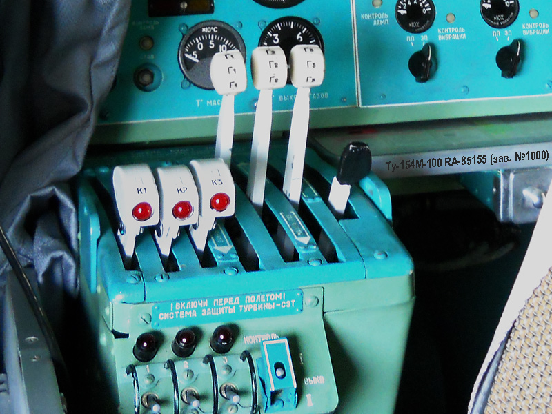 Рычаги отключения двигателей (РОД, стоп-краны), рычаги управления двигателями и рычаг стопорения РУД-ов панели бортинженера самолёта Ту-154М